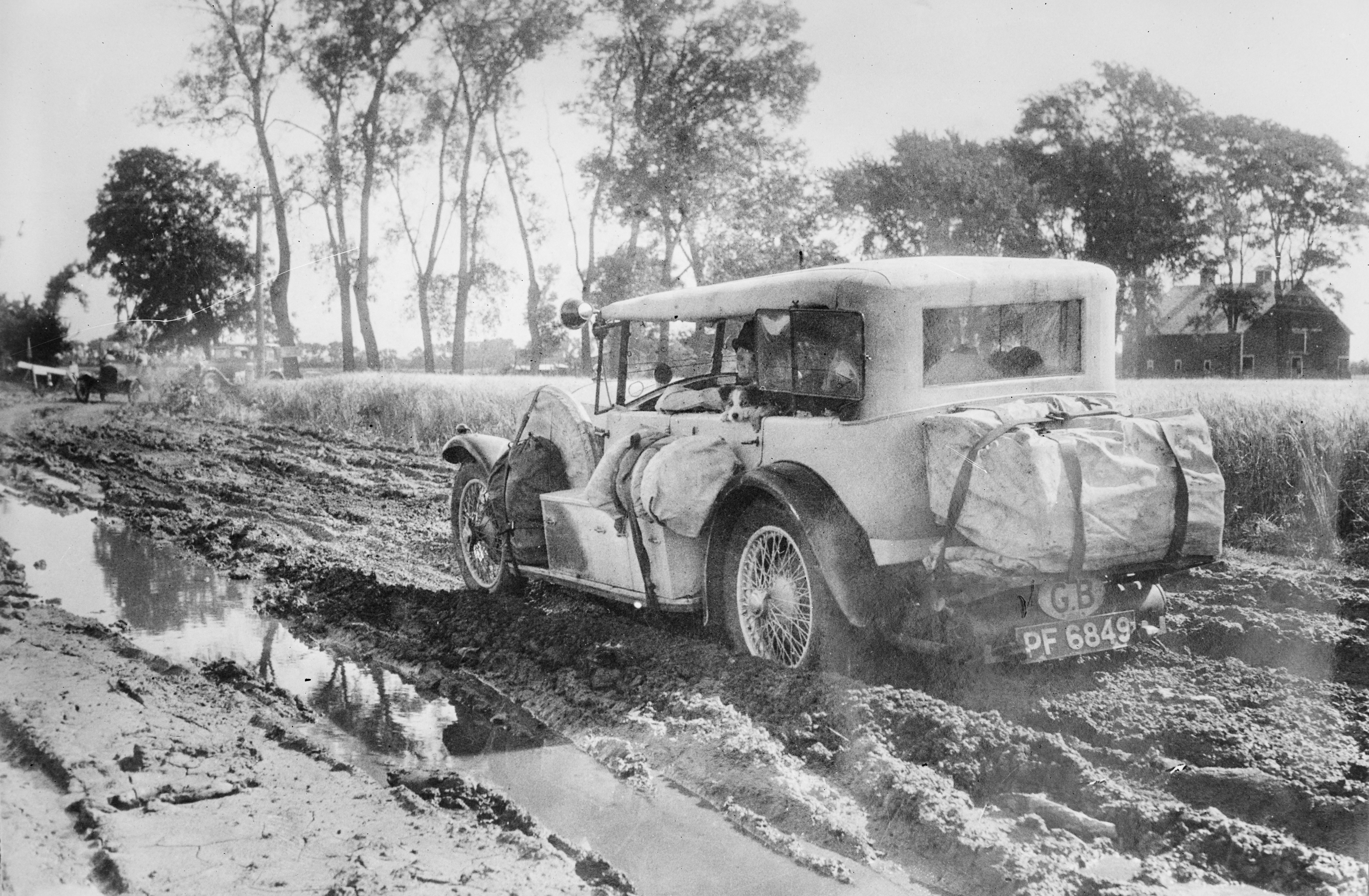 Miss Violet Cordery sur Invicta pendant son tour du monde automobile, photo de juillet 1927